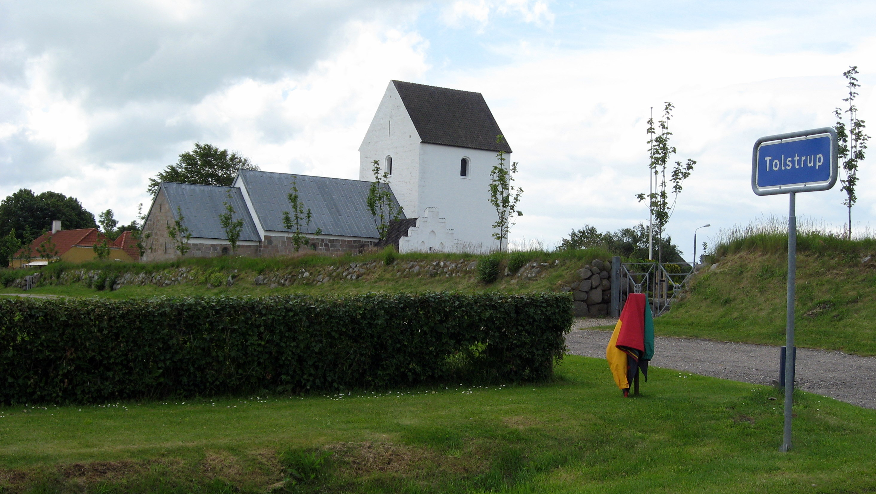 Tolstrup Kirke (Brønderslev Kommune)